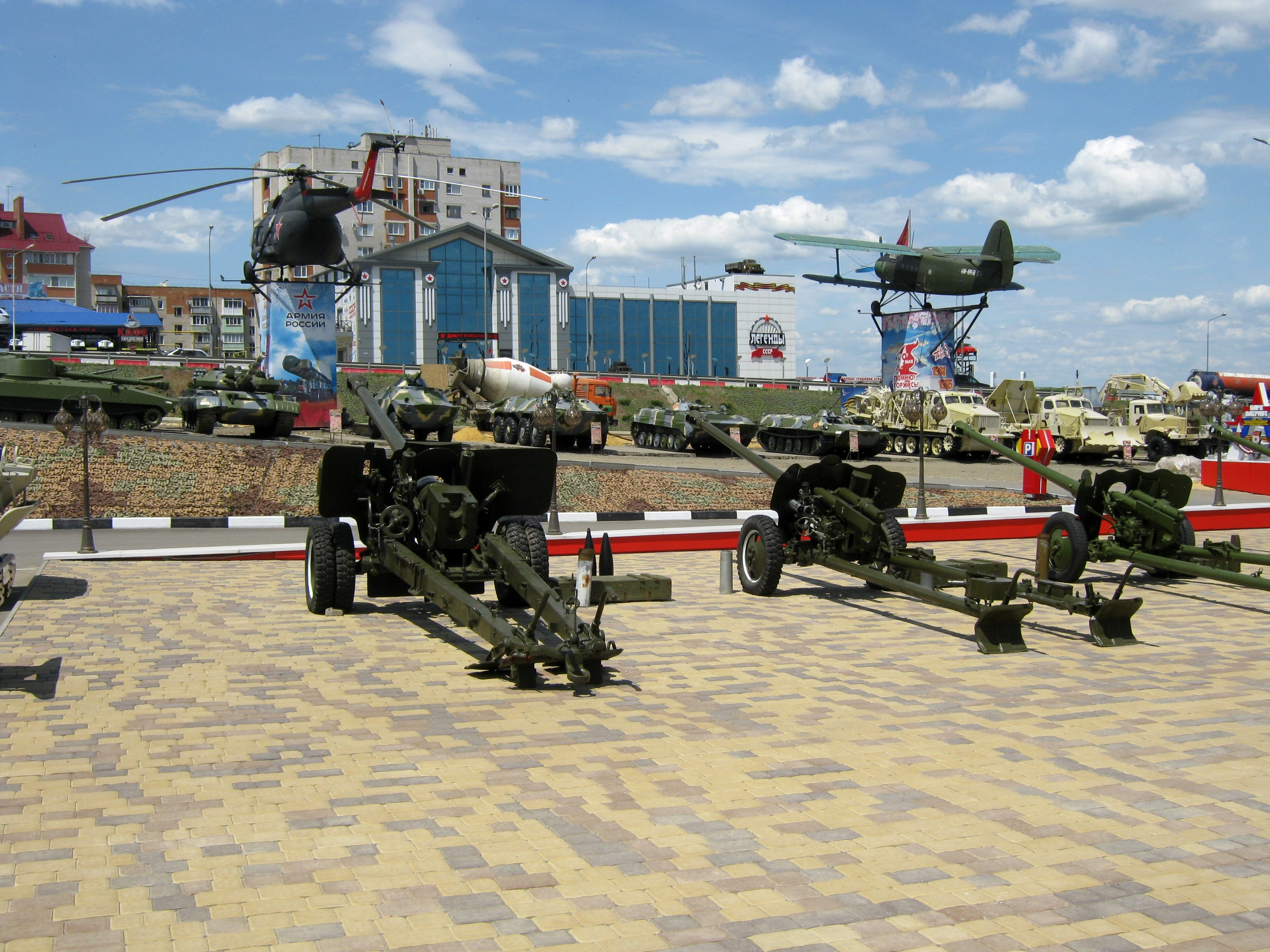 Каменск - парк Патриот 19